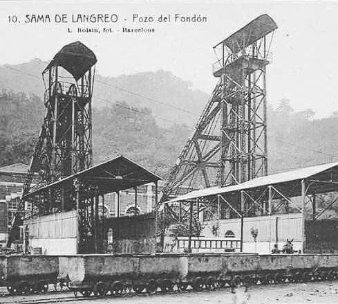 Postal antigua del pozo Fondón de Sama con sus dos castilletes.